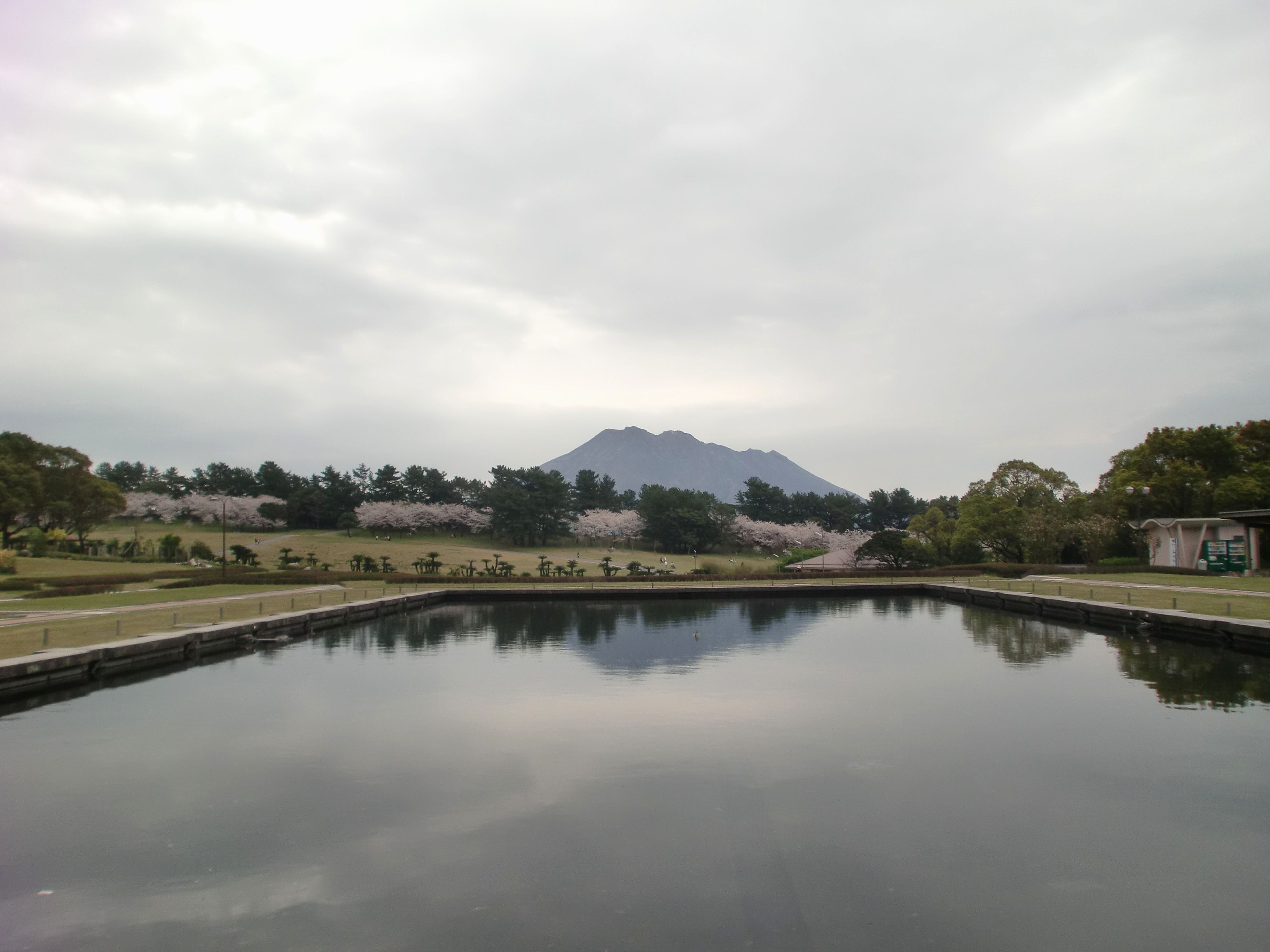 鹿児島県立吉野公園から桜島を望む。